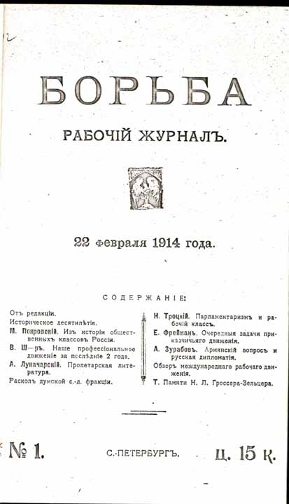 Борьба (журнал, 1914, обложка)